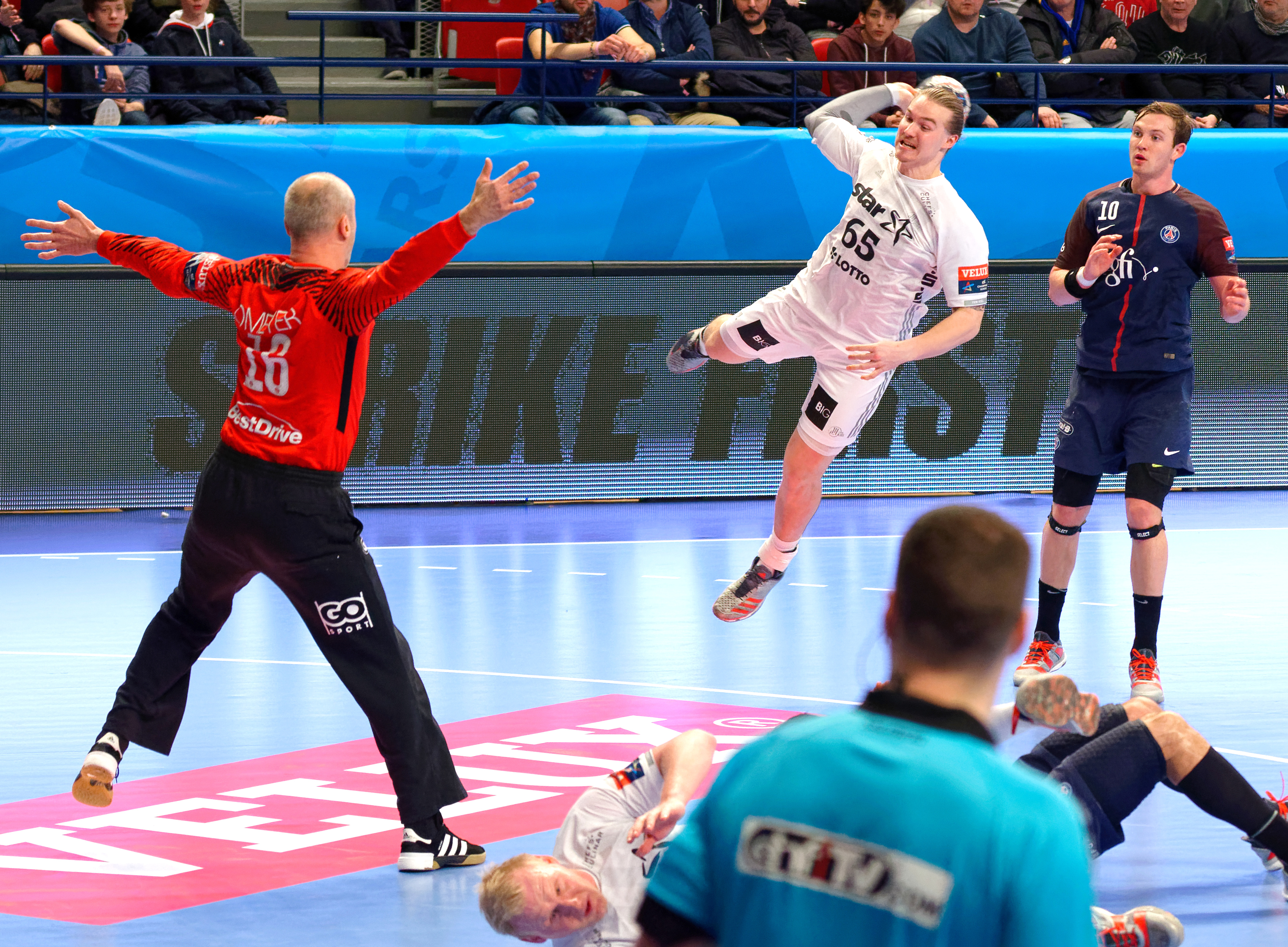 Rencontre de phase de groupe de la ligue des champions 2017/18 entre le PSG et Kiel. A Coubertin, le 4 mars 2018.